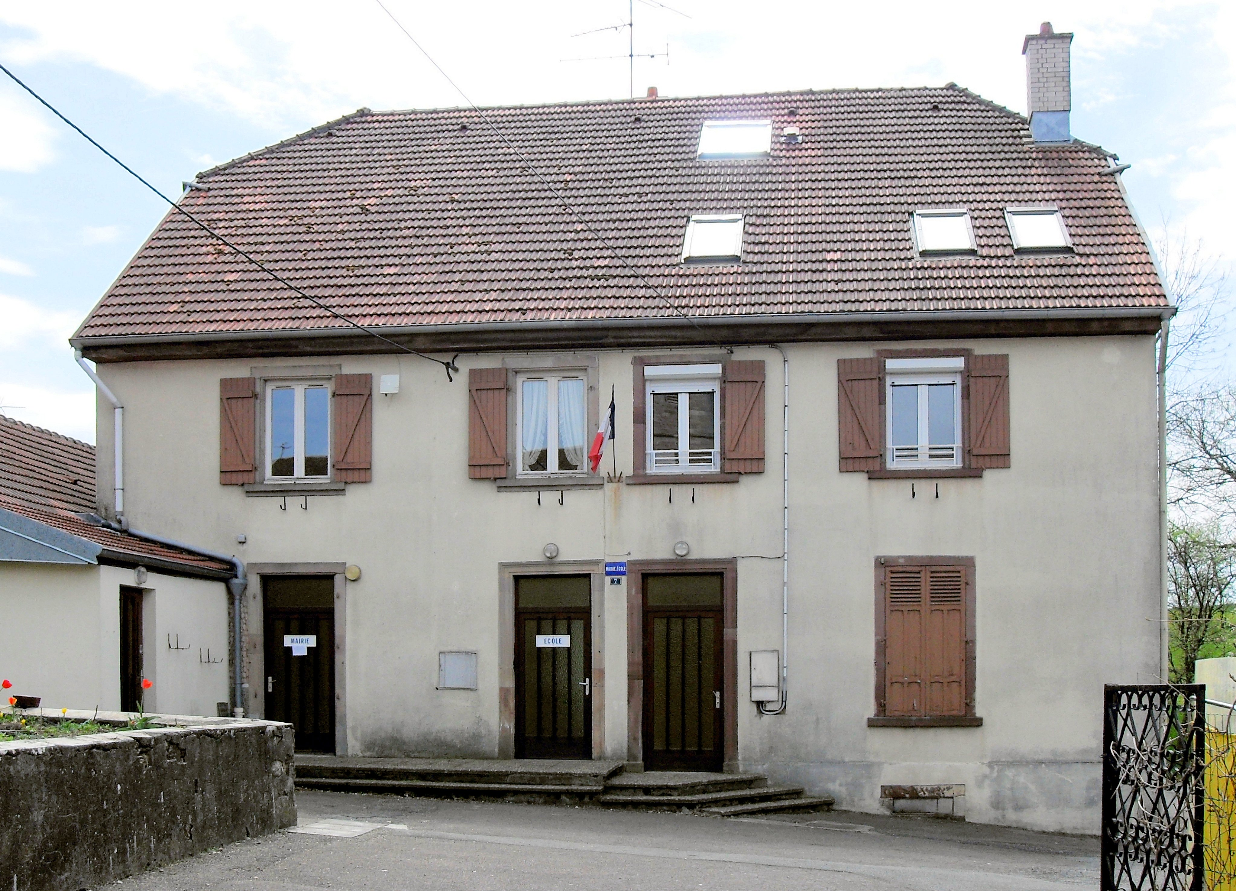 La mairie de Buc